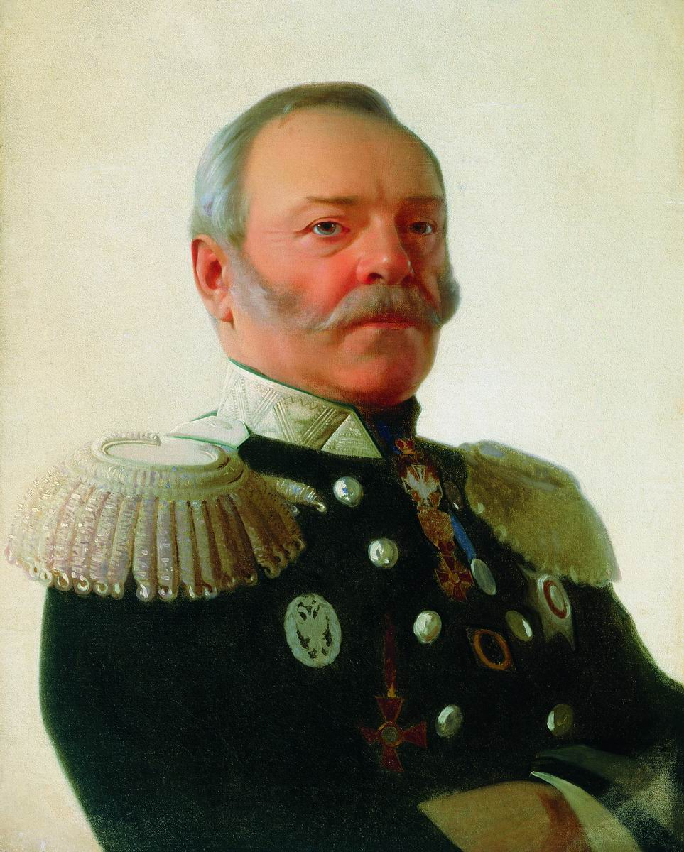 Портрет министра путей сообщения Павла Петровича Мельникова 1869